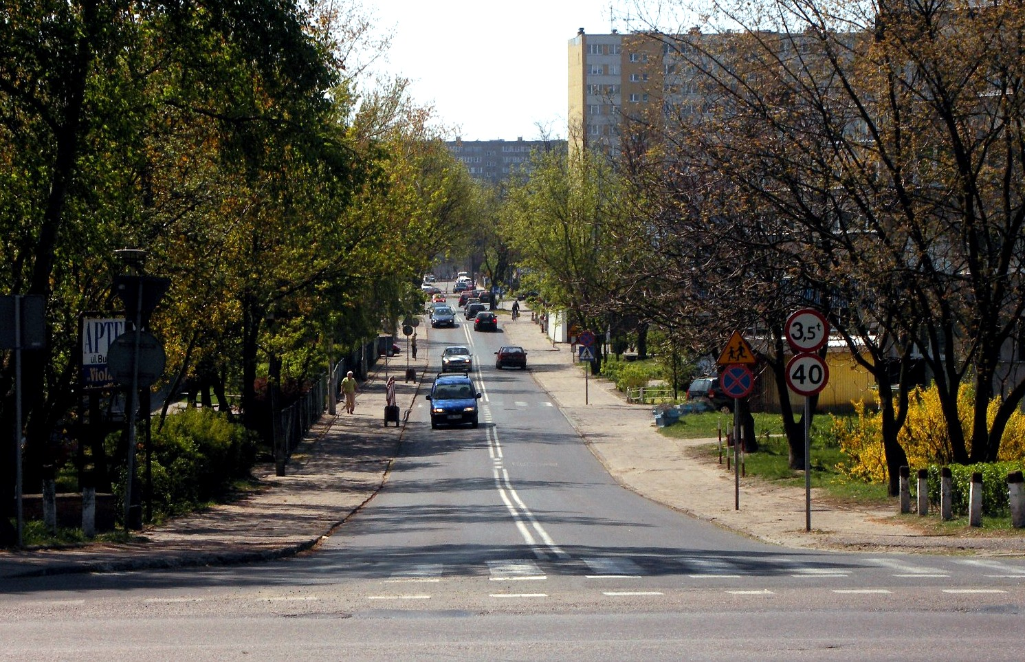 ul. Hutnicza